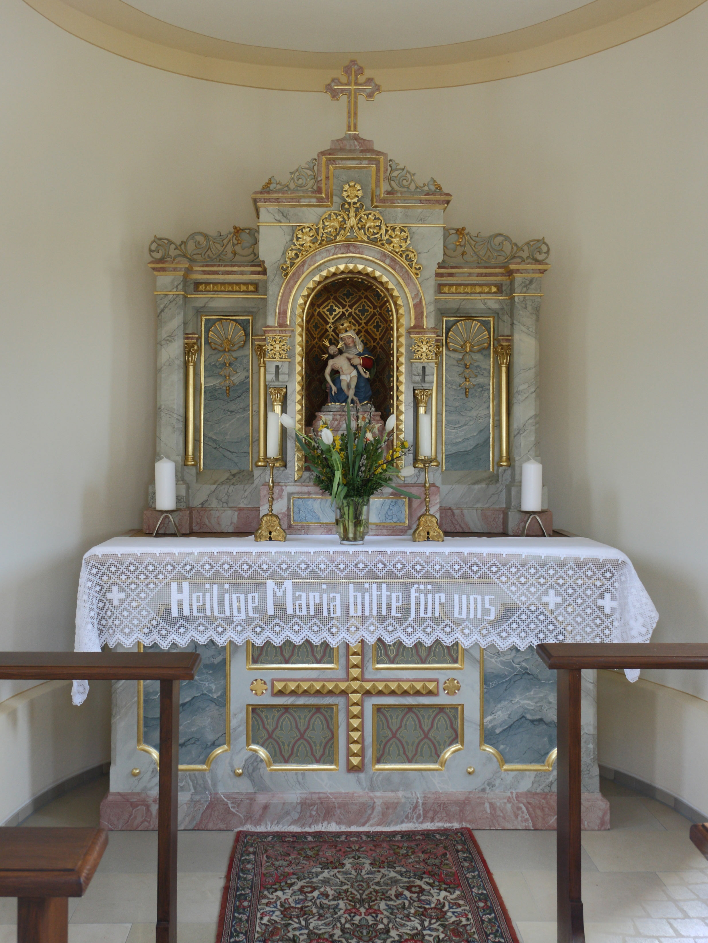 Kath. Votivkapelle in Nattenhausen, Gemeinde Breitenthal; Altar der Kapelle mit kleiner Pietà um 1700